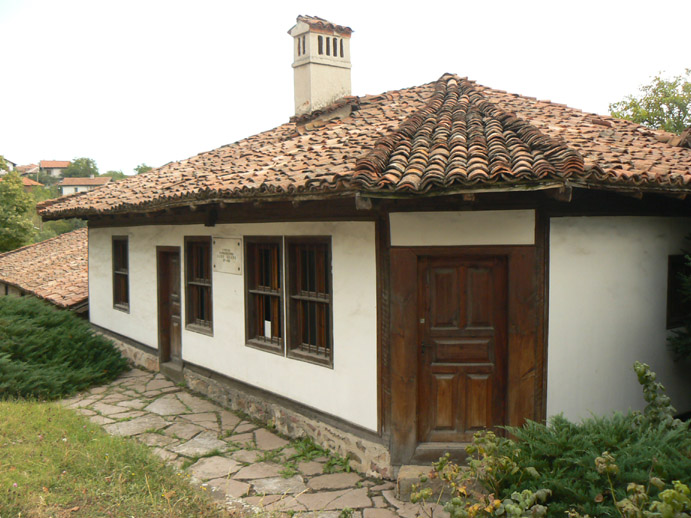 Elin Pelin's native home in the village of Bailovo, Bulgaria. Родният дом на Елин Пелин в с. Байлово, България